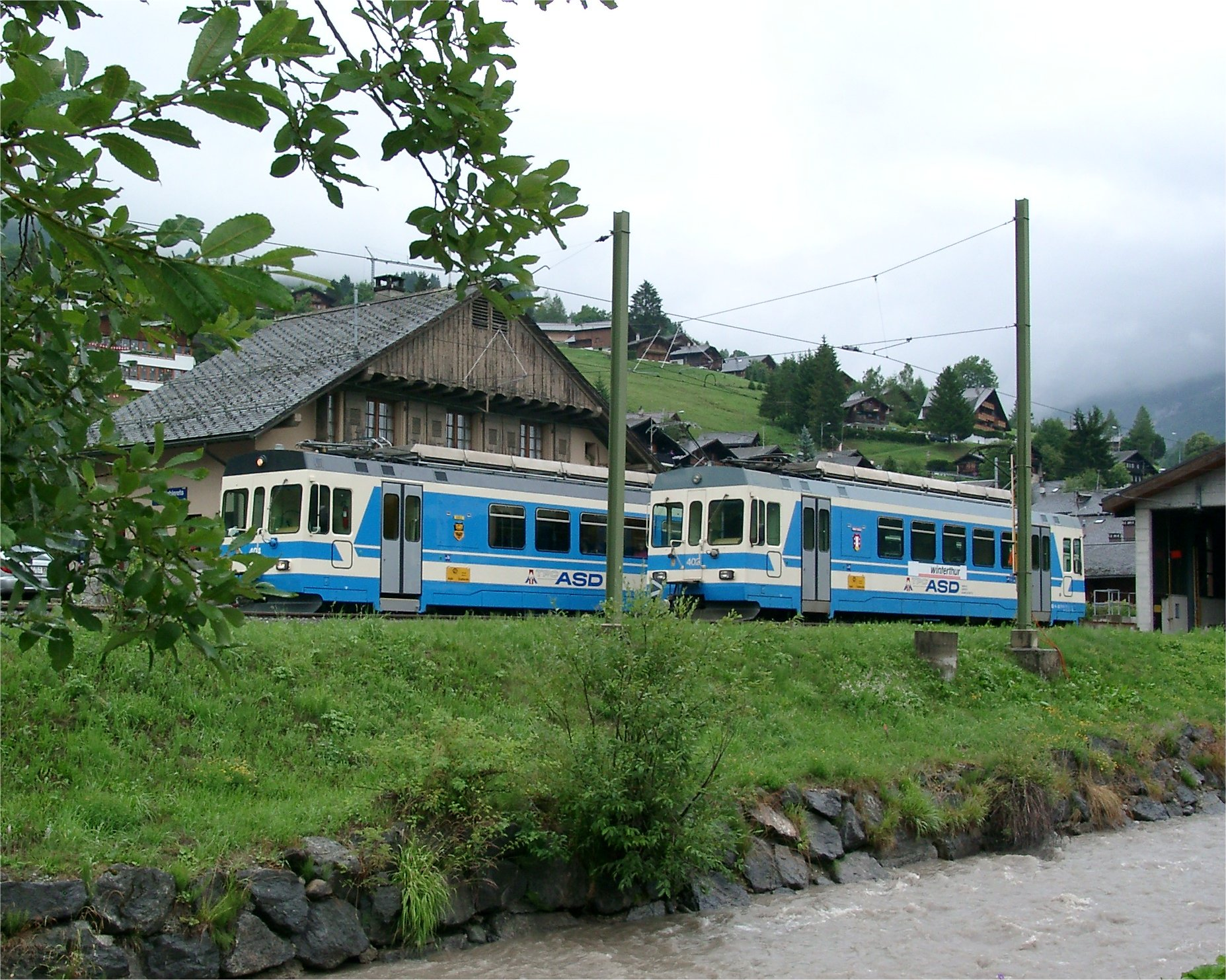 Aigle-Sepey-Diablerets-Bahn (ASD): Ansicht des Bahnhofes les Diablerets (VD)